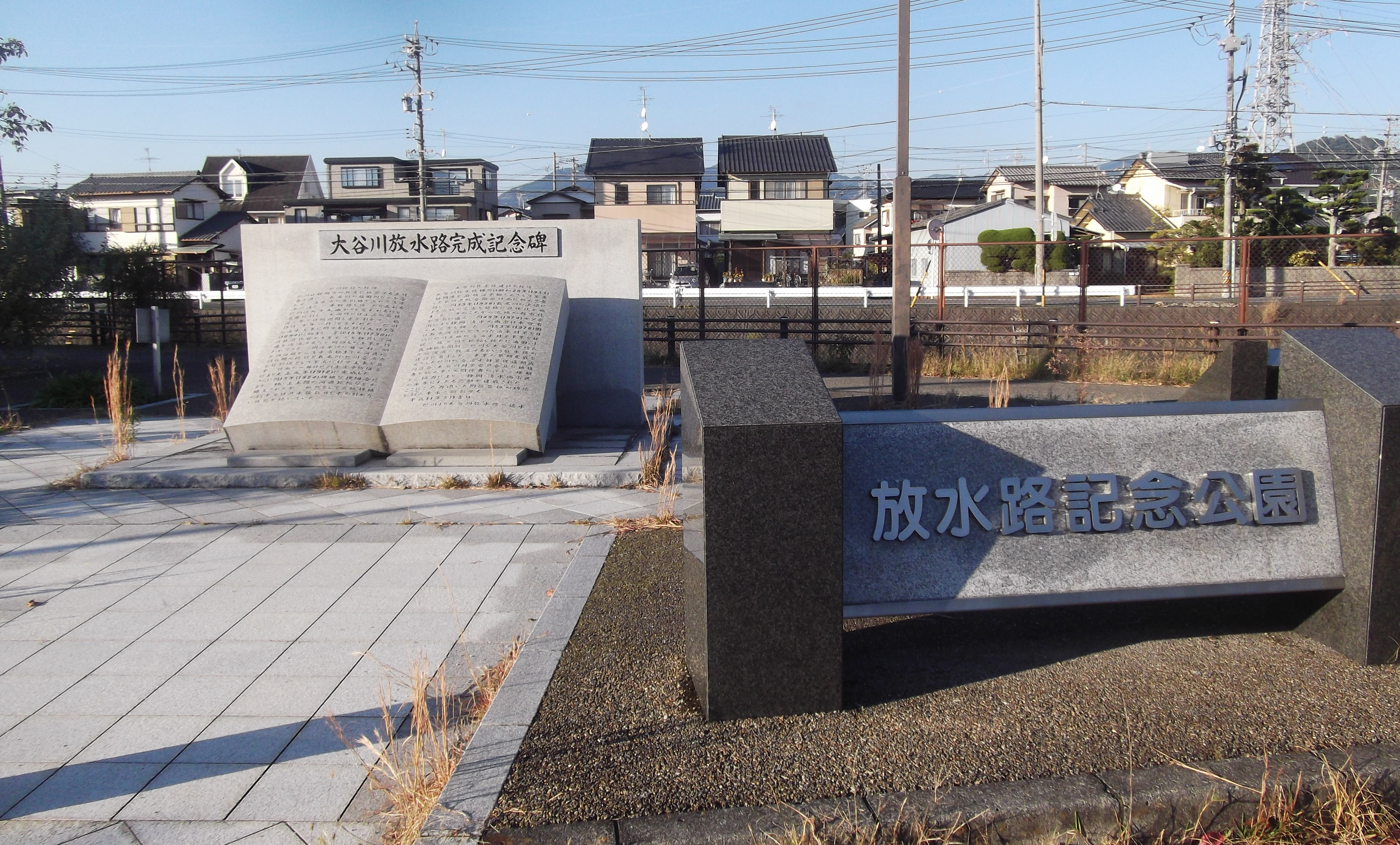 静岡市葵区古庄にある、大谷川放水路の放水路記念公園。